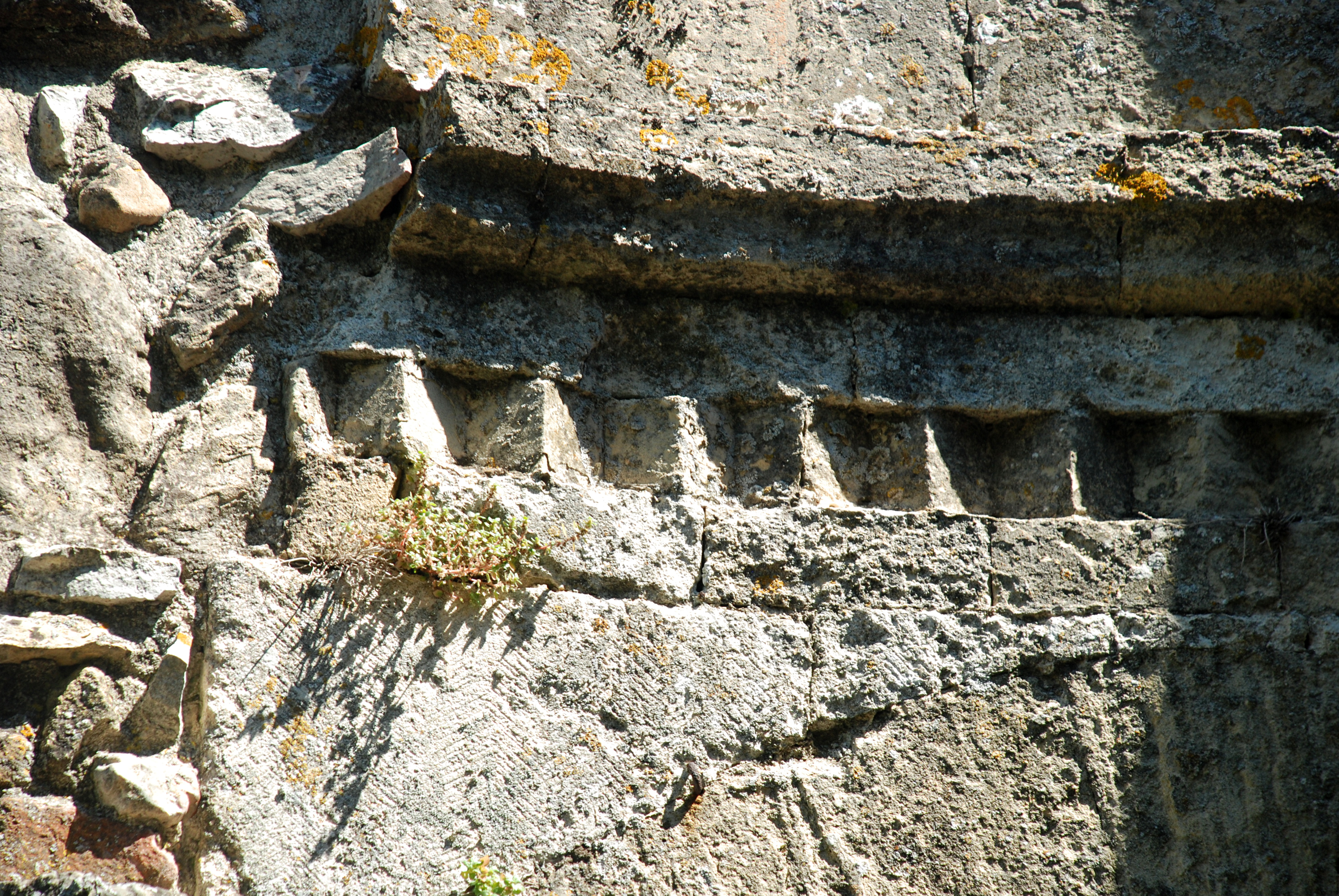 France - Gard - Chapelle Saint-Martin de Saint-Victor-la-Coste